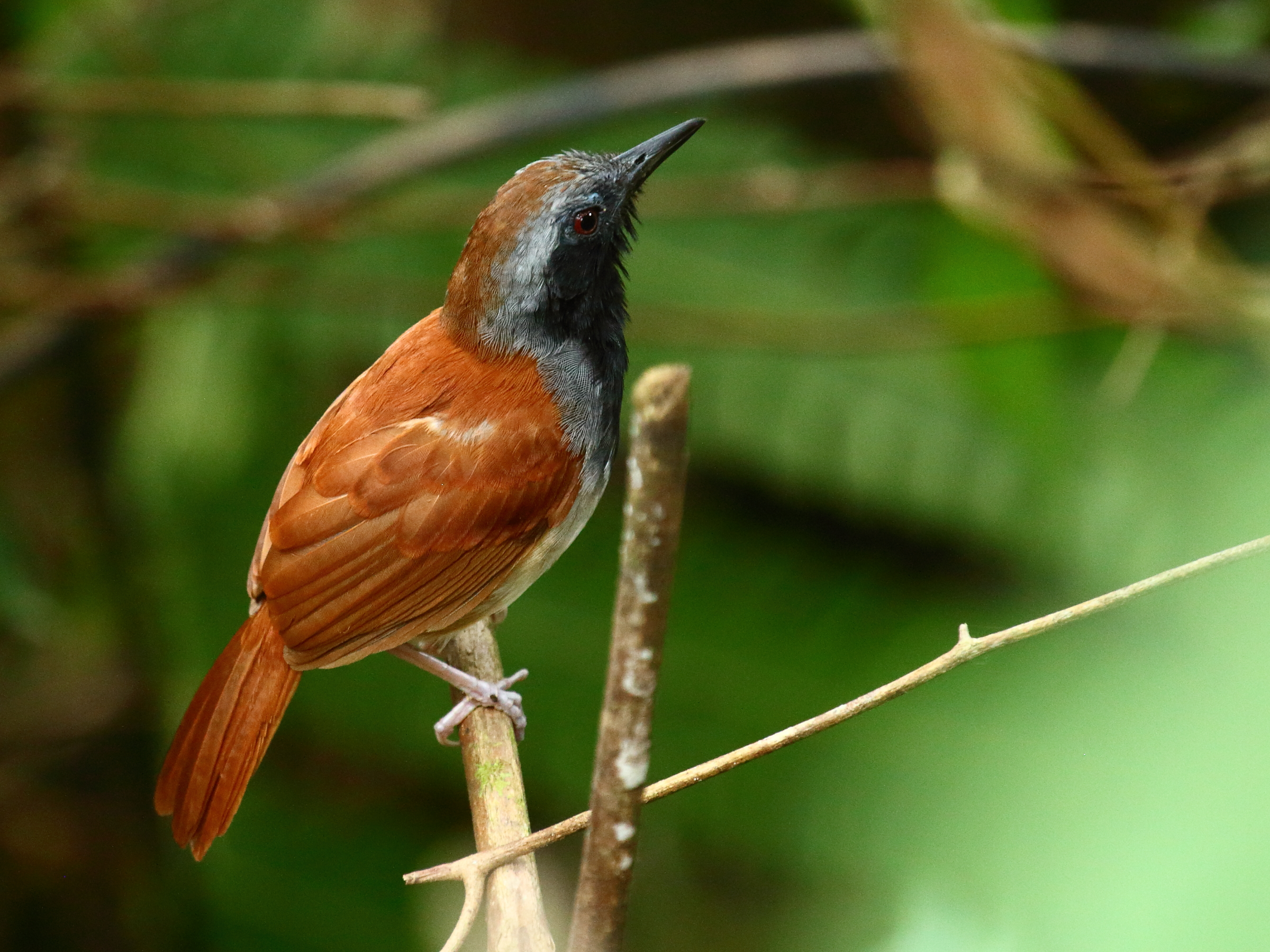 arima blanch road near Morne La Croix, Trinidad